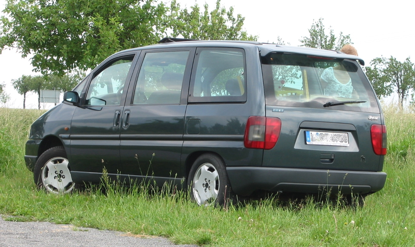 Fiat Ulysse Baujahr 1994